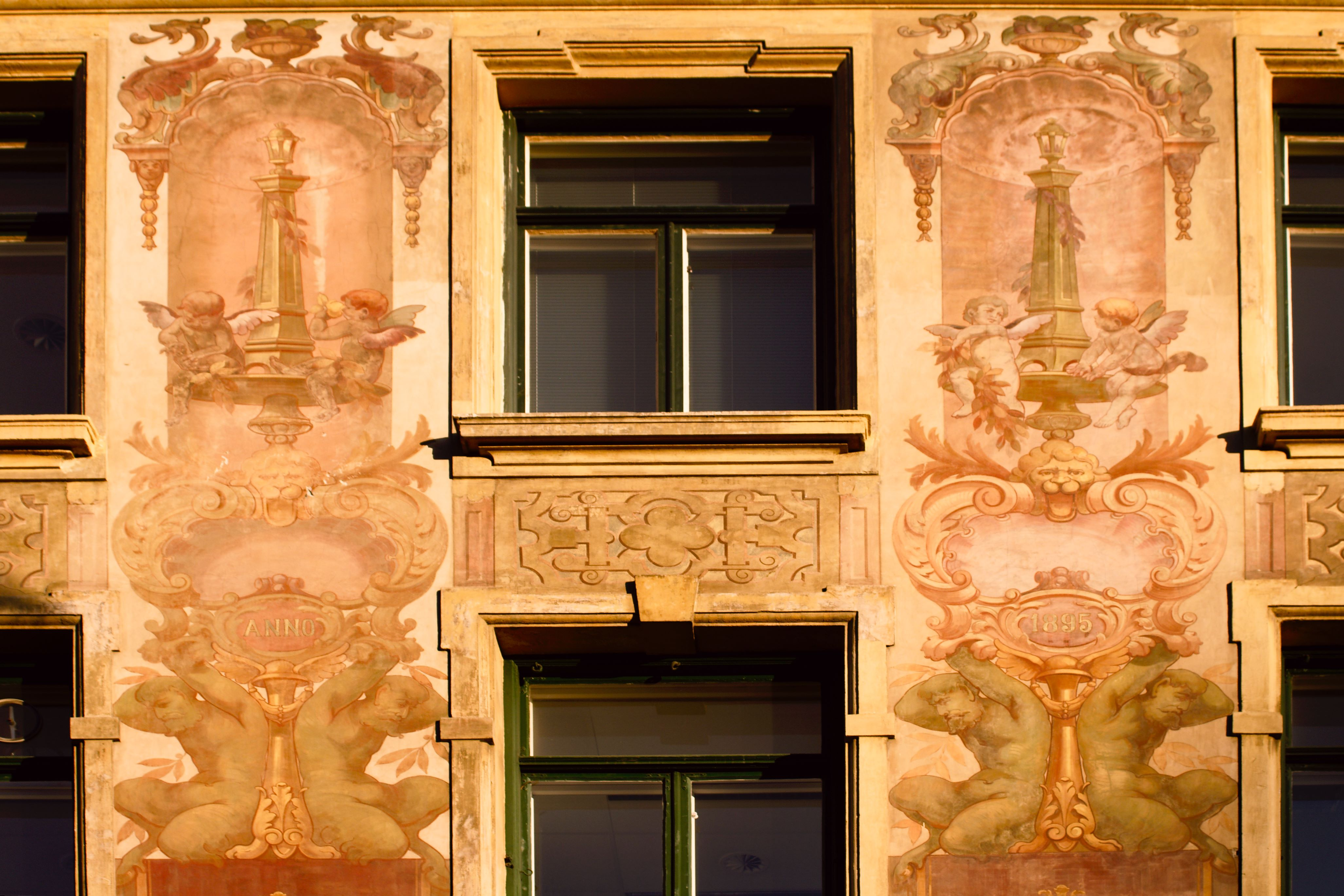 Skreddergården; forretningsgård i Akersgata i Oslo med fasademalerier i de øvre etasjene.